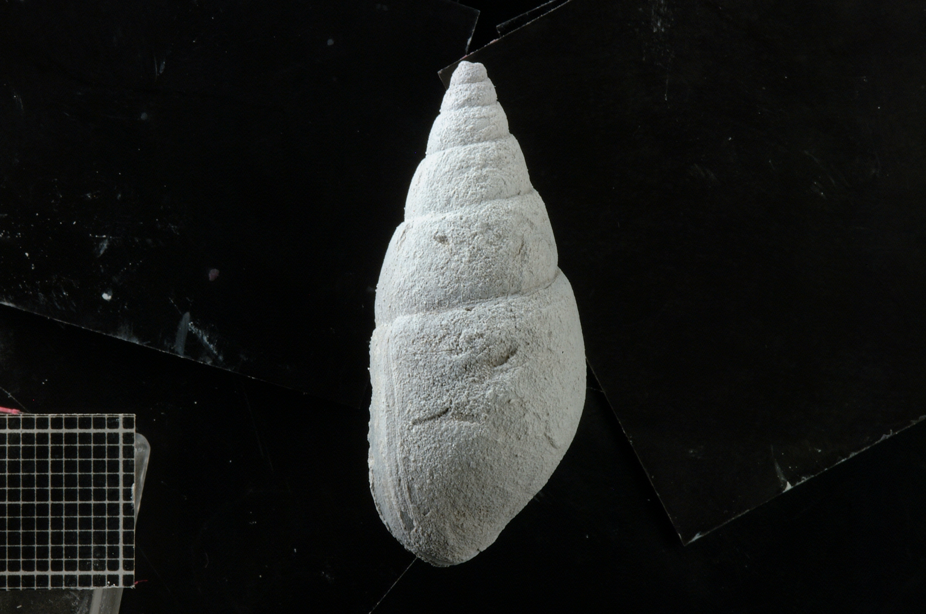 Ejemplar del gastrópodo marino fósil Poasia sp.